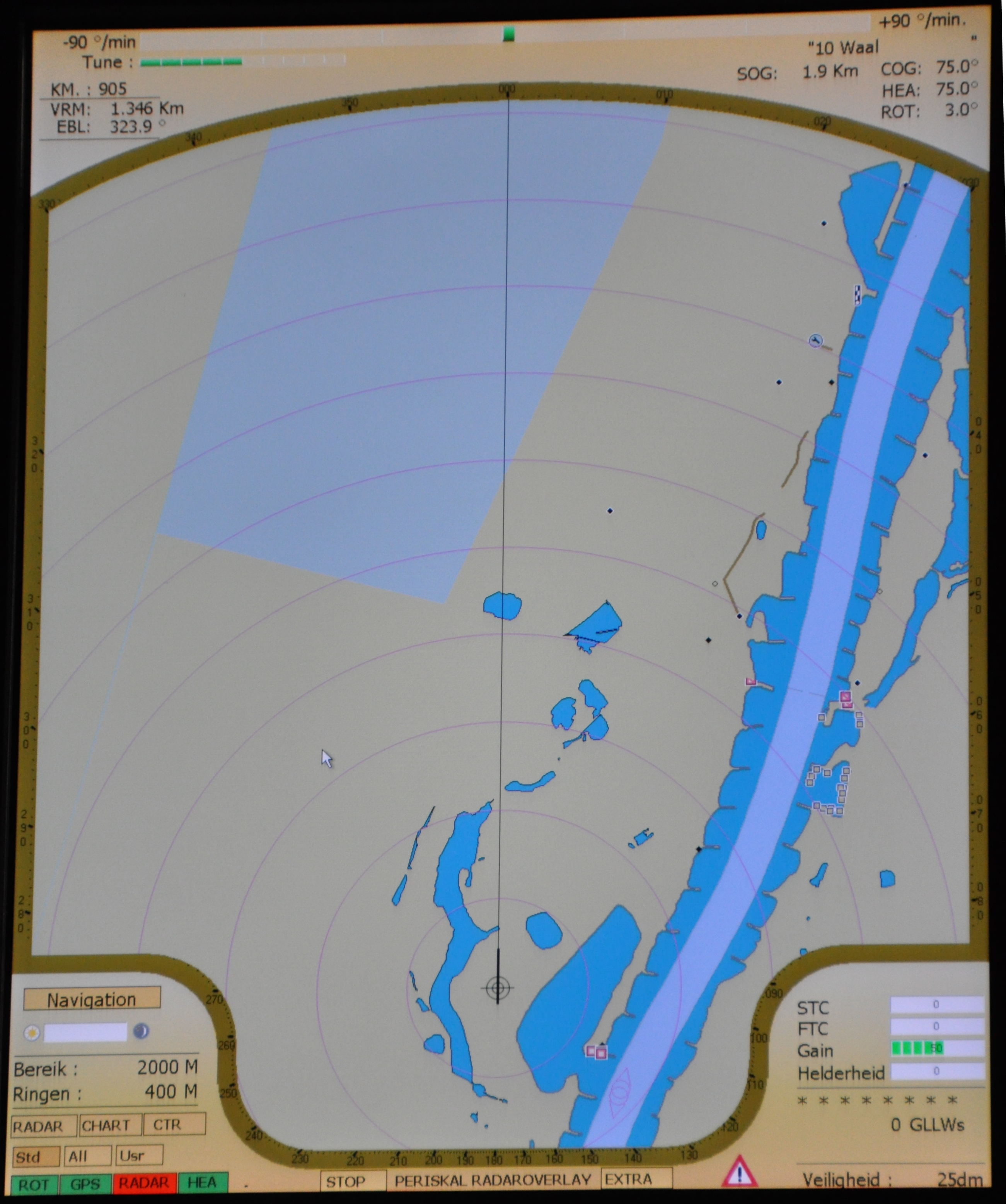 Periskal radar overlay